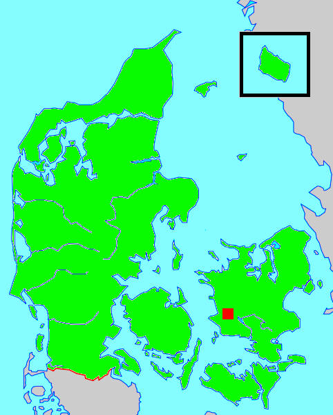 Kort sem sýnir staðsetningu Slagelse í Danmörku.